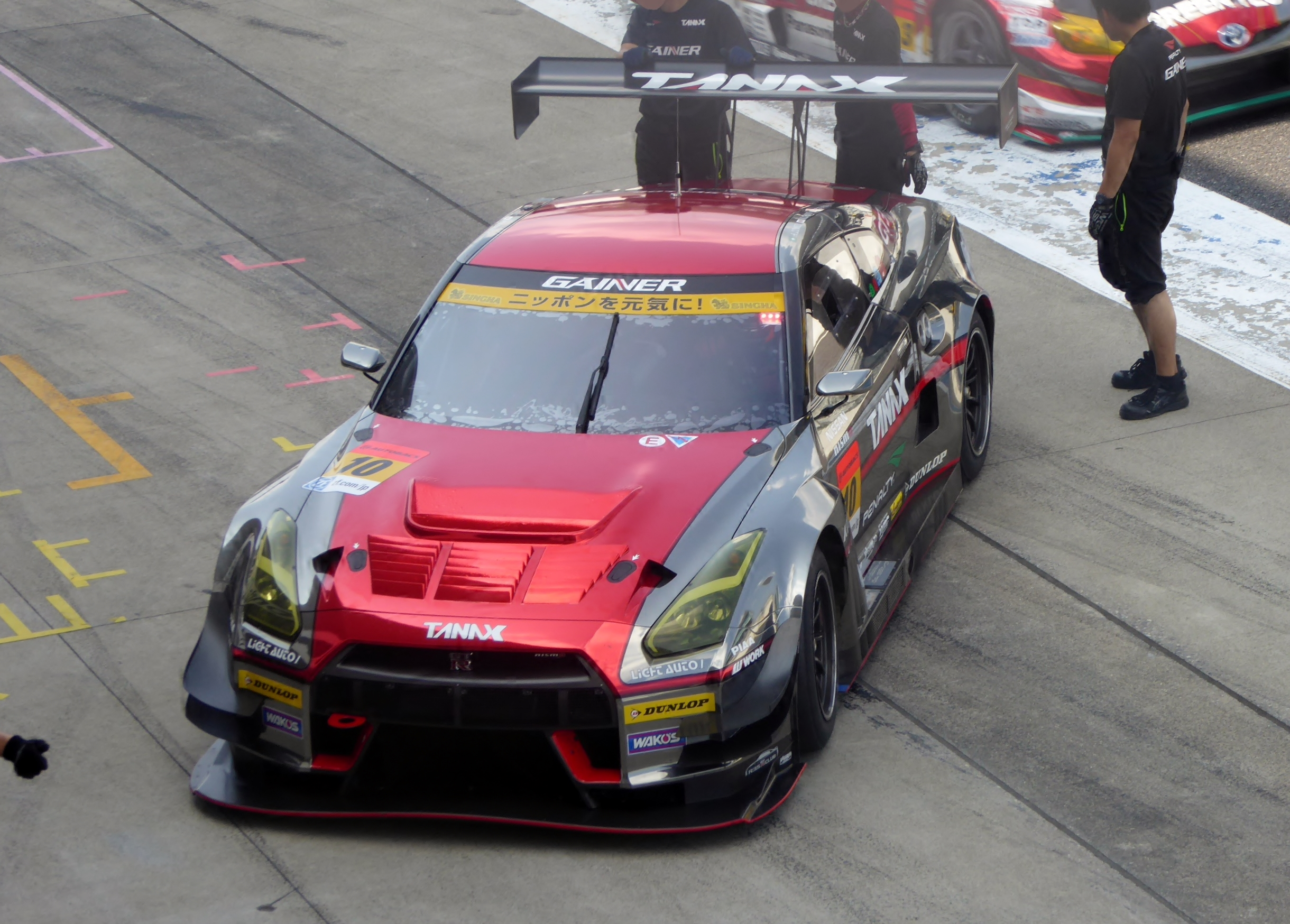 2015年度鈴鹿タイヤテストにおいての一幕を撮影。